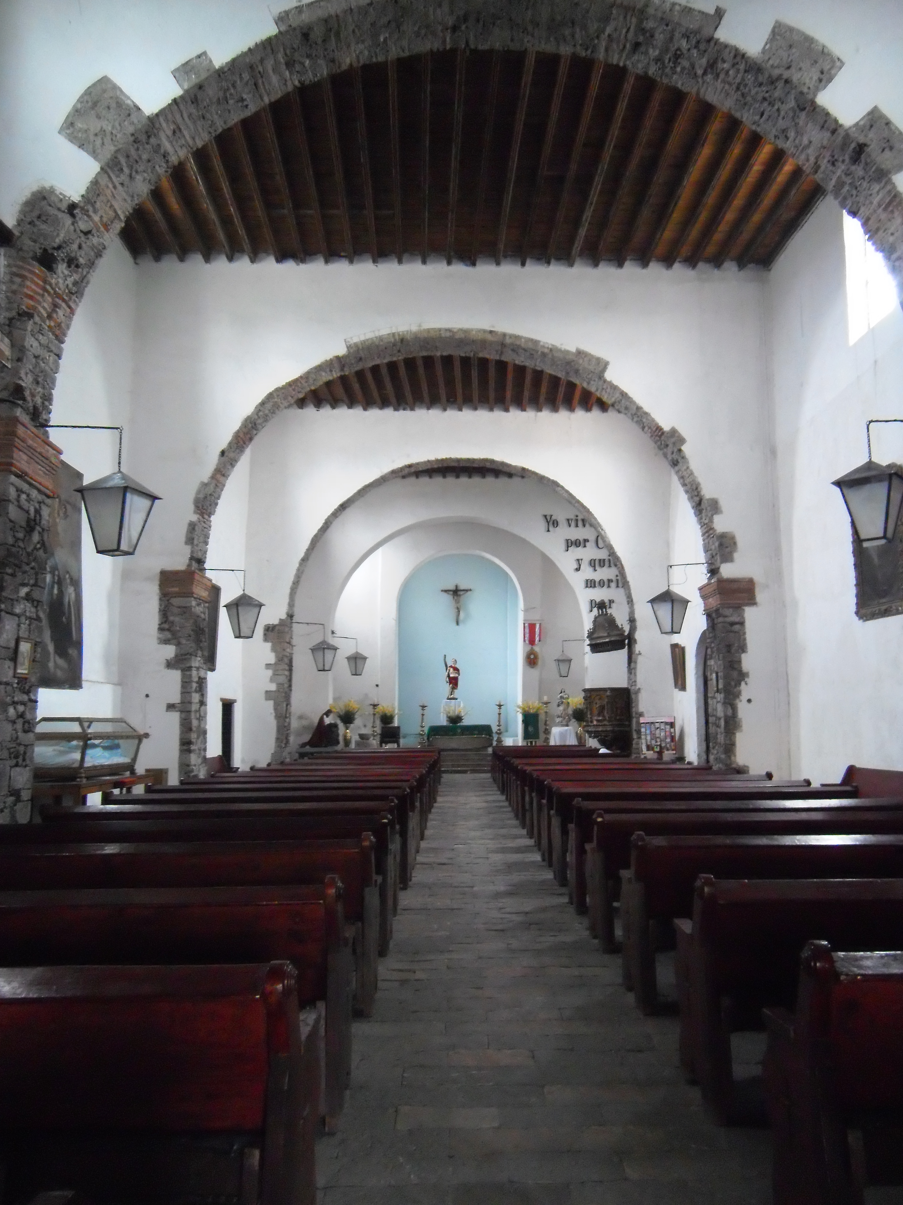 Interior de la Parroquia de San Sebastián